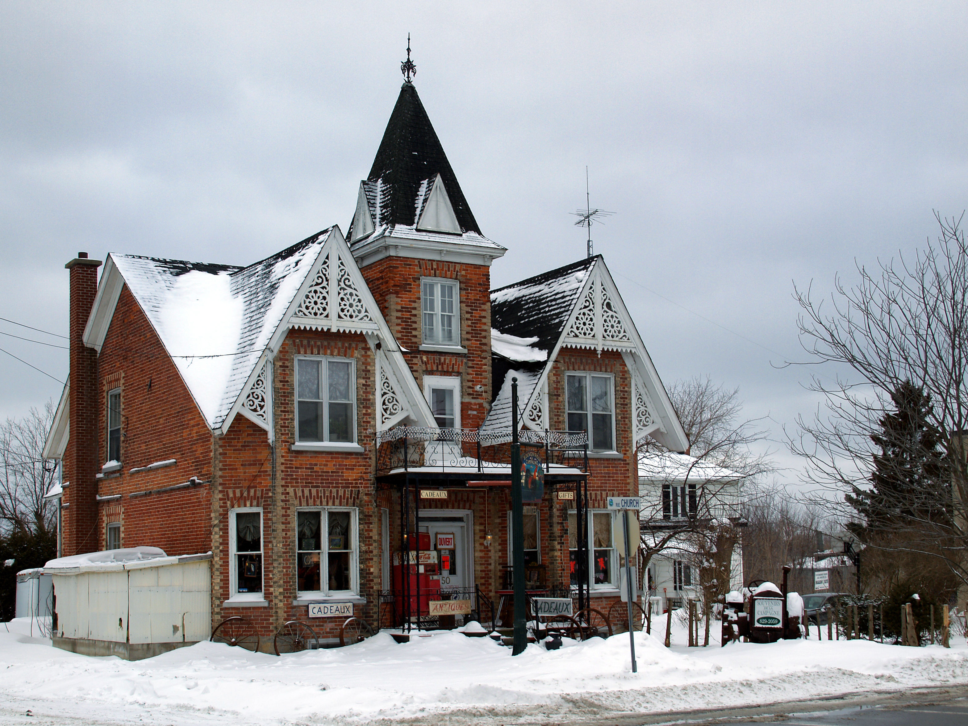 Ormstown, Montérégie (Québec) - Magasin d'articles cadeaux, souvenirs, dans la rue Church